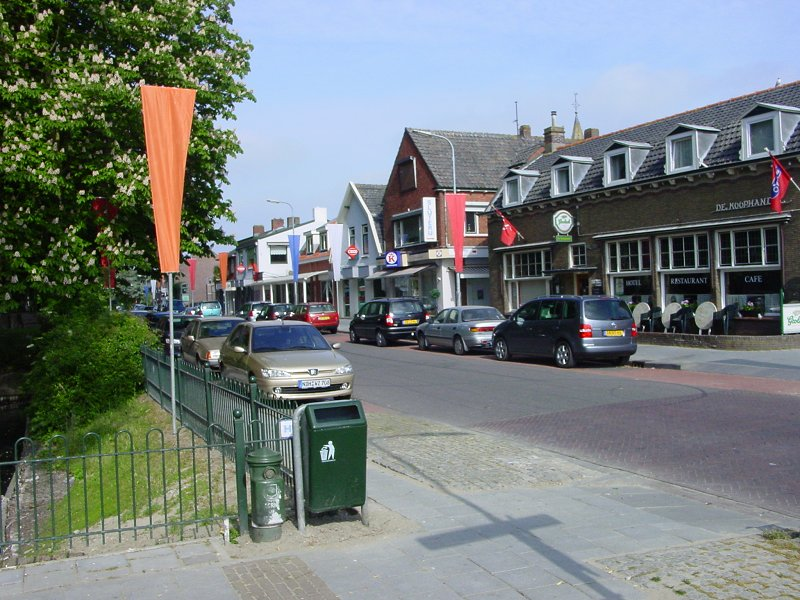 Krabbendijke in The Netherlands